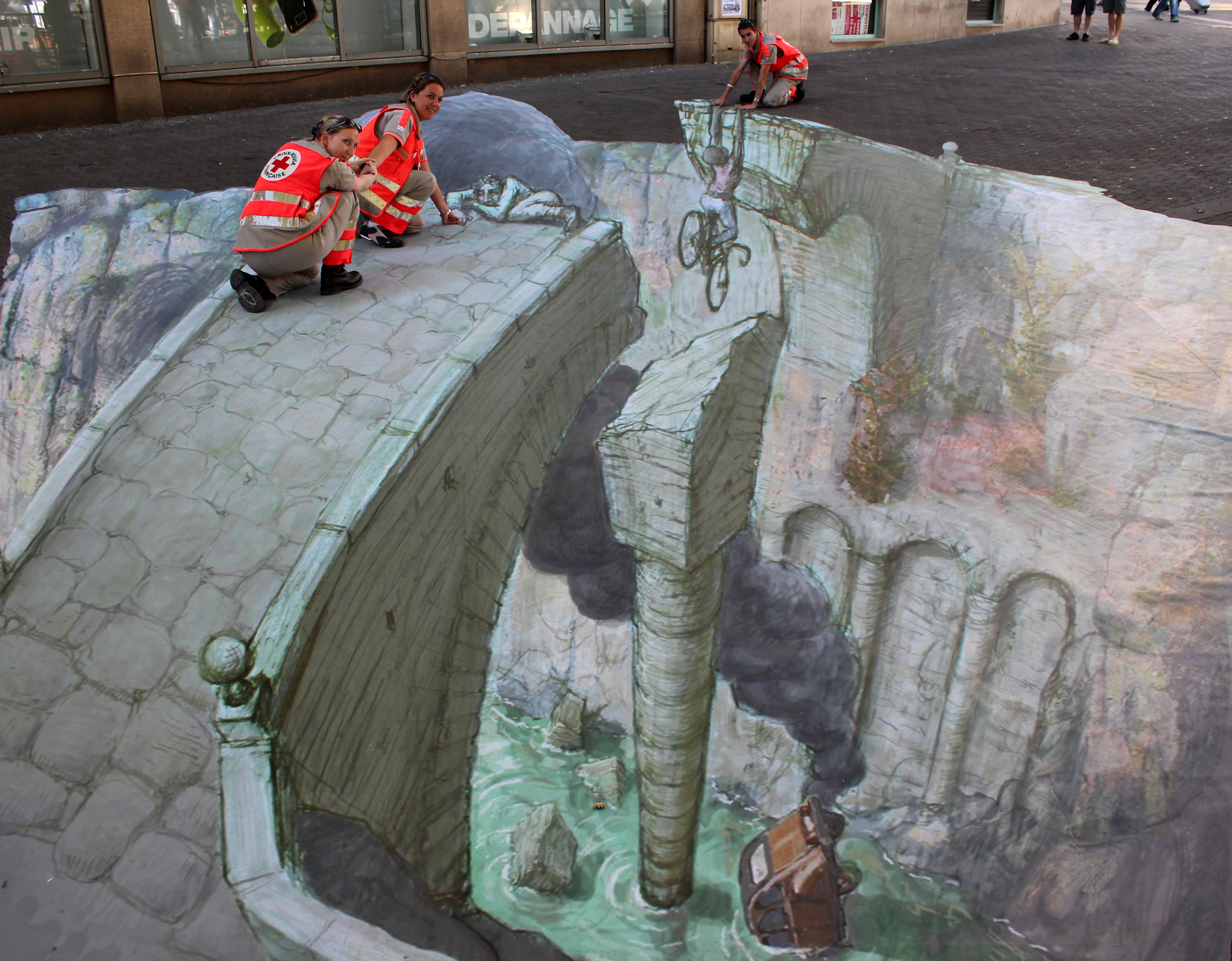 Anamorphosis Eduardo Relero